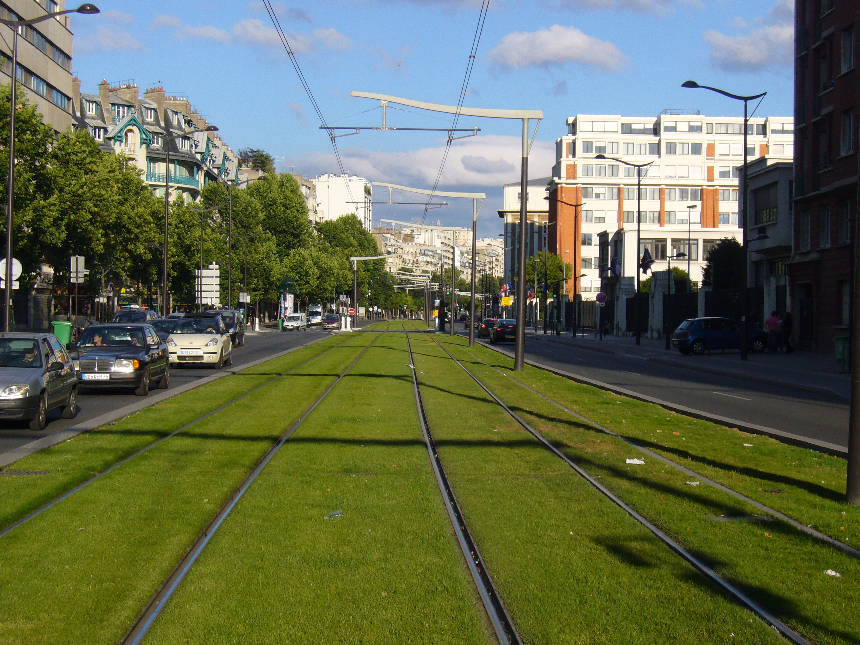 Voies engazonnées de la ligne T3 du tramway d'Île de France.